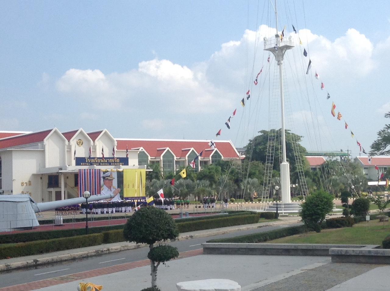 ด้านหน้าโรงเรียนนายเรือ